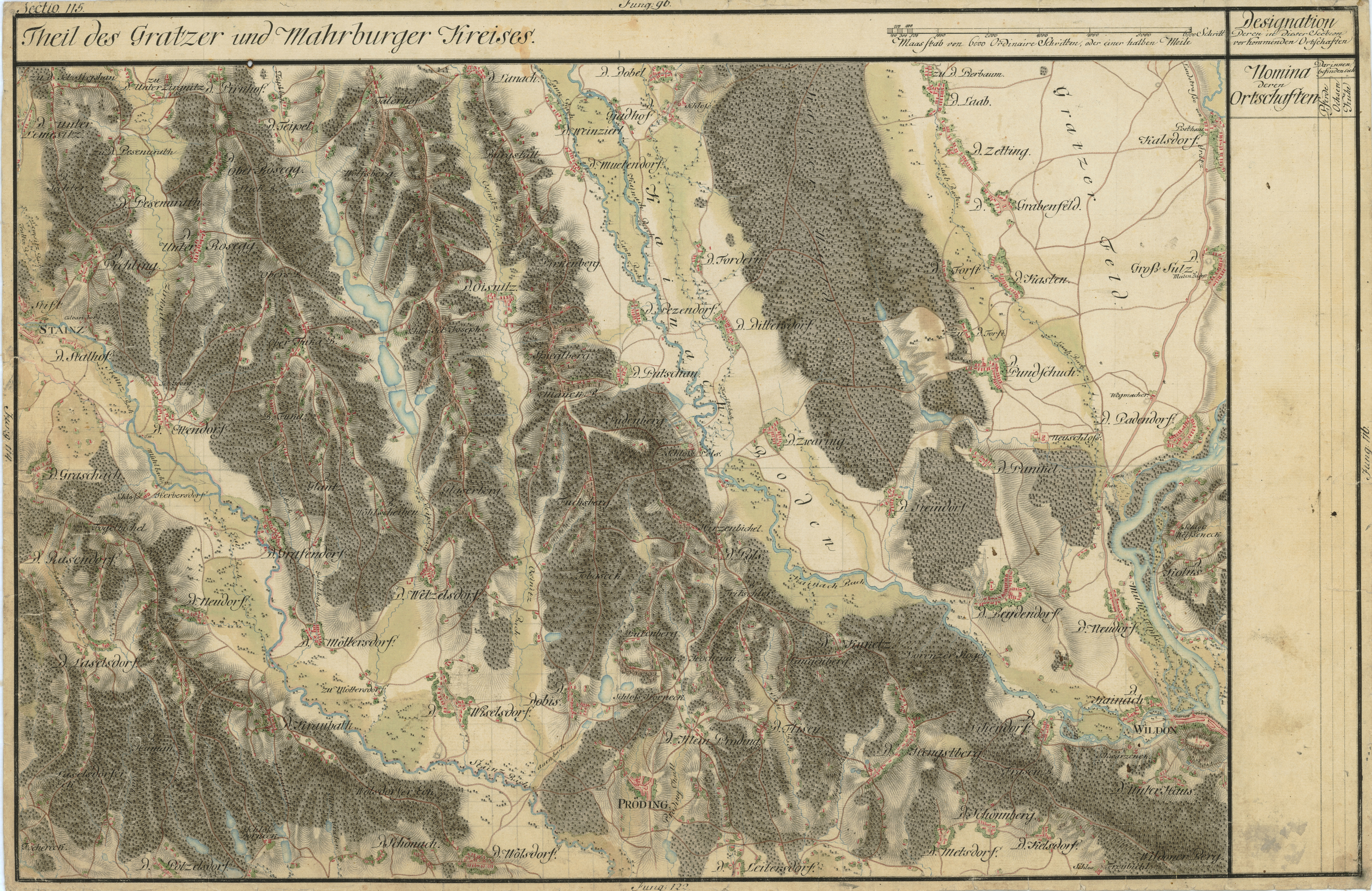 historische Landkarte BIXa054 section 115 Josephinische Landesaufnahme: Gebiet von Stainz bis Wildon, Steiermark, Österreich